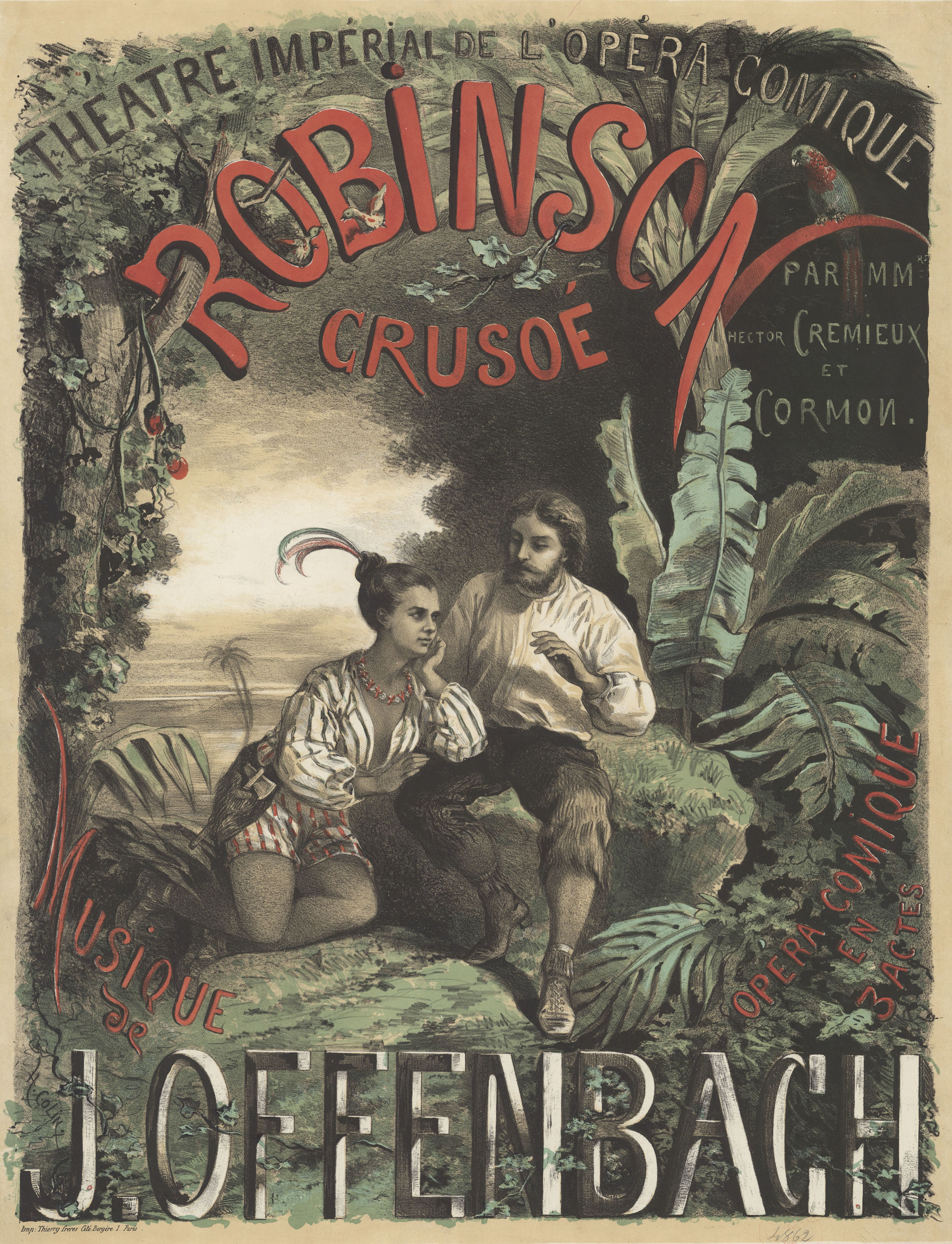 "Théatre Impérial de l'Opéra-Comique. Robinson Crusoé par MMrs Hector Crémieux et Cormon, opéra-comique en 3 actes. Musique de Jacques Offenbach" A poster for the première production of Offenbach's Robinson Crusoé. Colour lithograph, 70 x 56 cm, printed by Imp. Thierry frères Cité Bergère 1 (Paris)